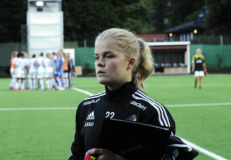 a_102_5640